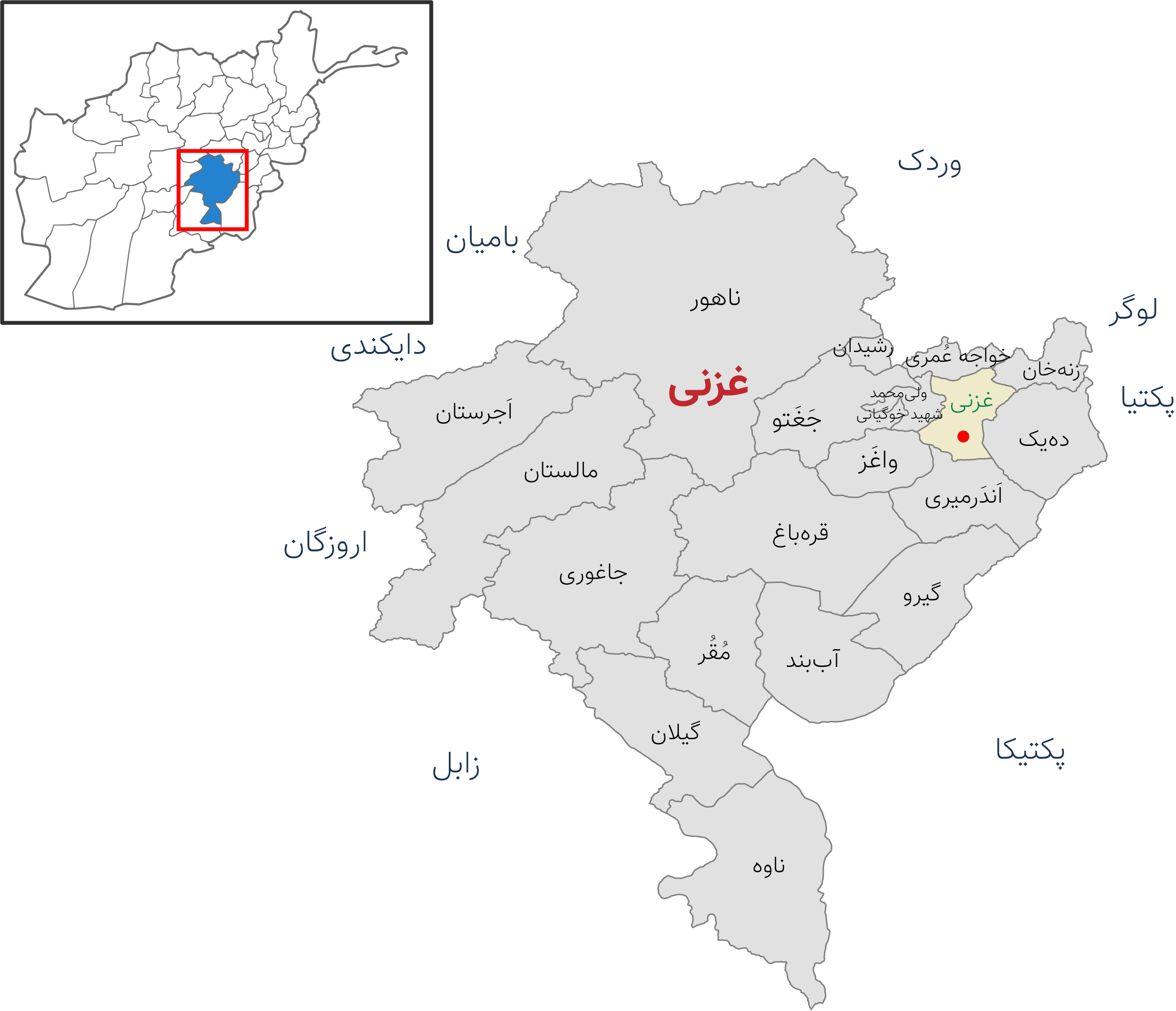 نقشه ولایت غزنی